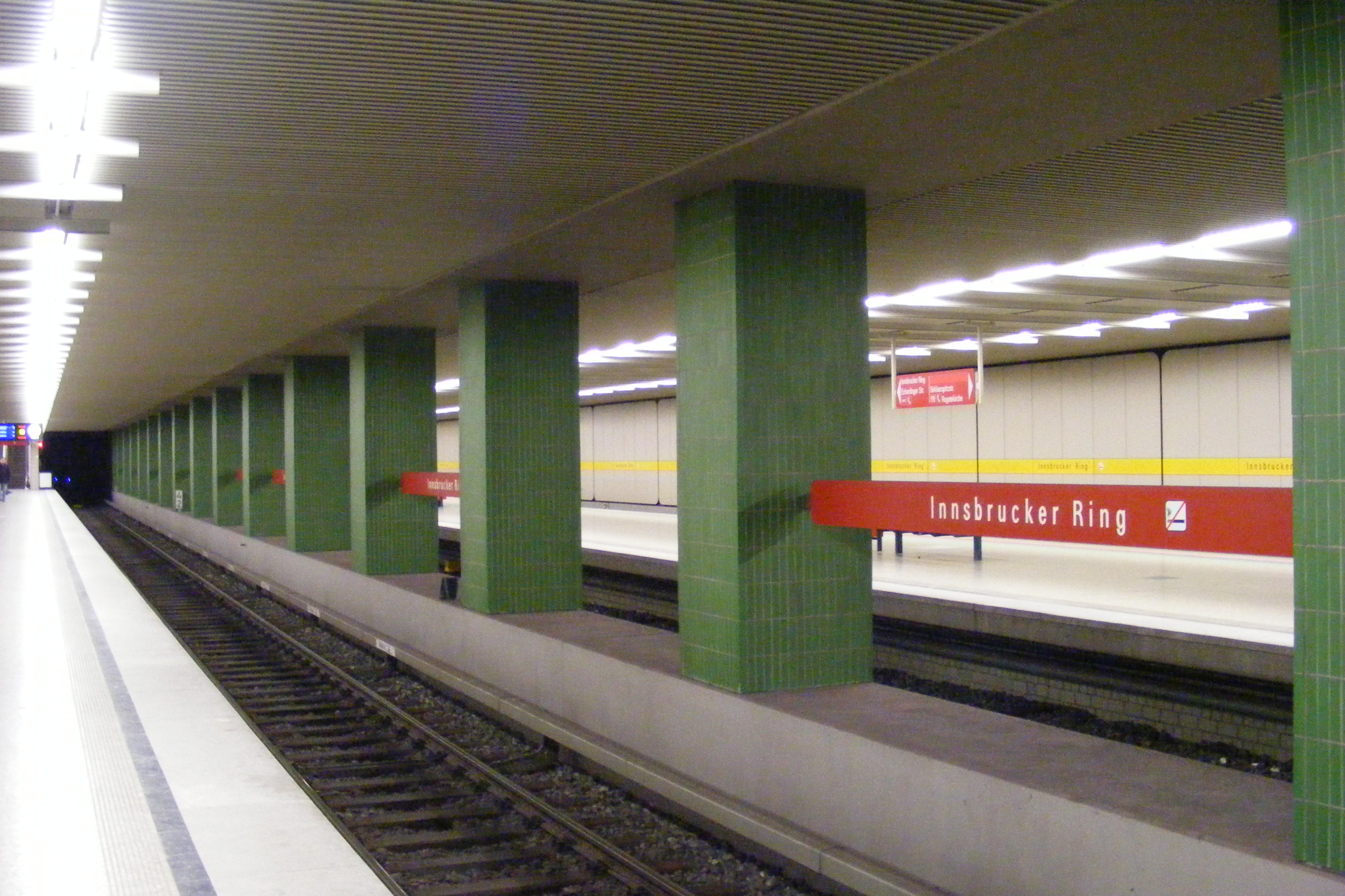 U-Bahn-Station Innsbrucker Ring, München